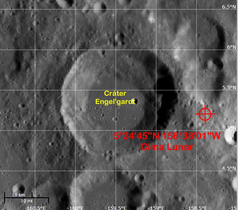 Localización del Punto más alto de la Luna en el cráter Engel'gardt (Imagen LRO)